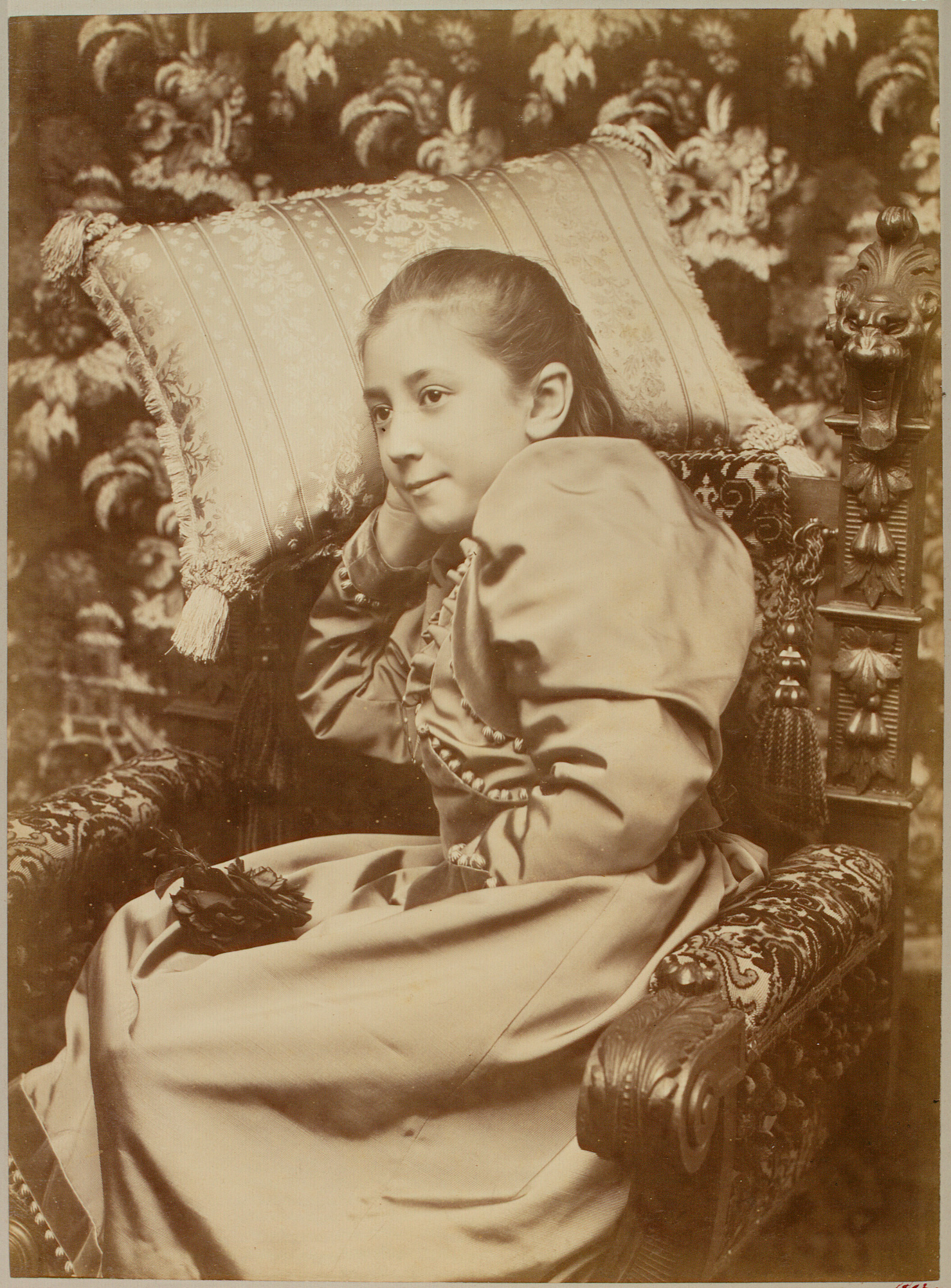 Беларуская (тарашкевіца): Эльжбэта Марыя Тышкевіч